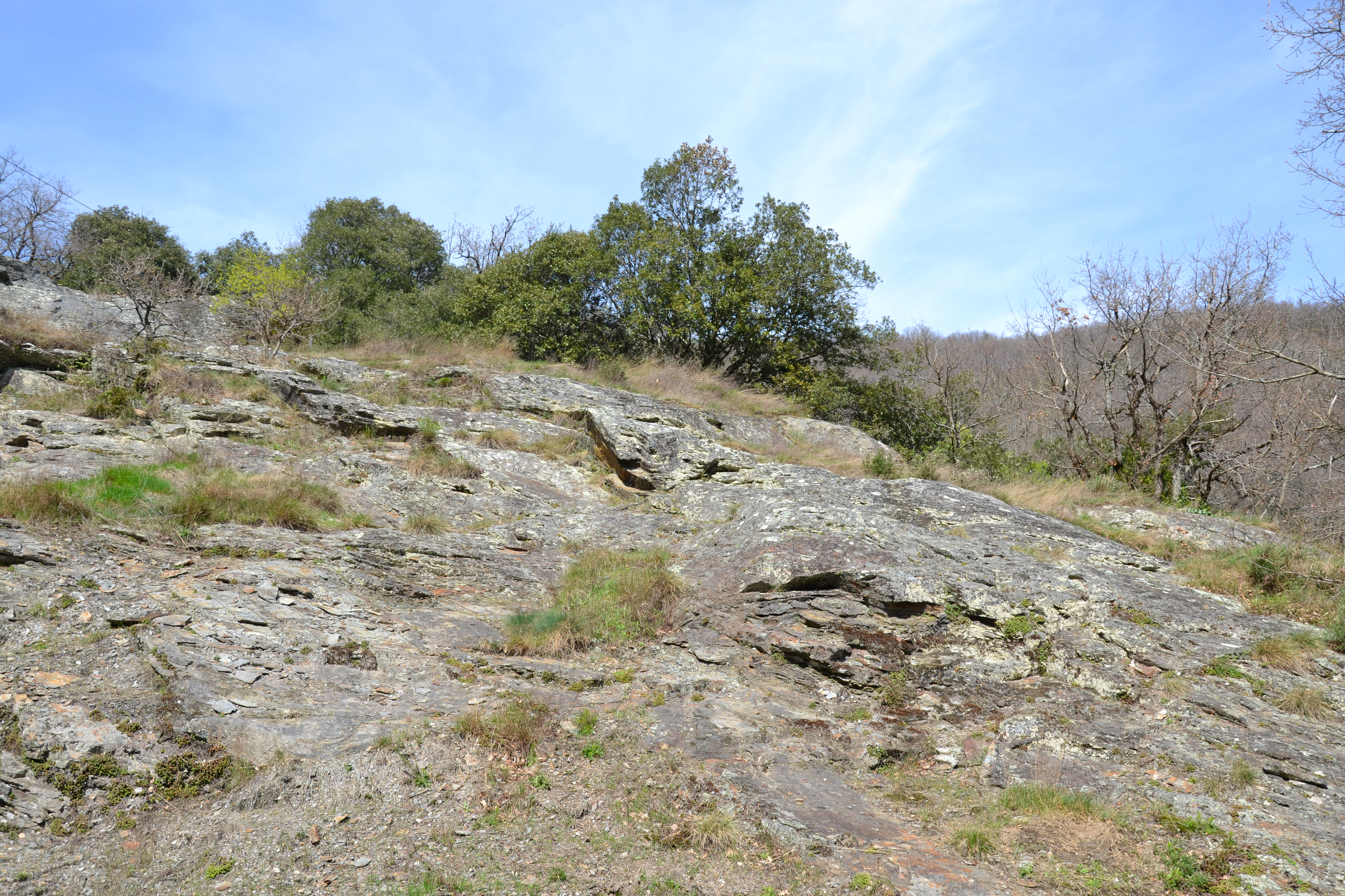 Affleurements de schistes métamorphiques près du village de La Tourette-Cabardès